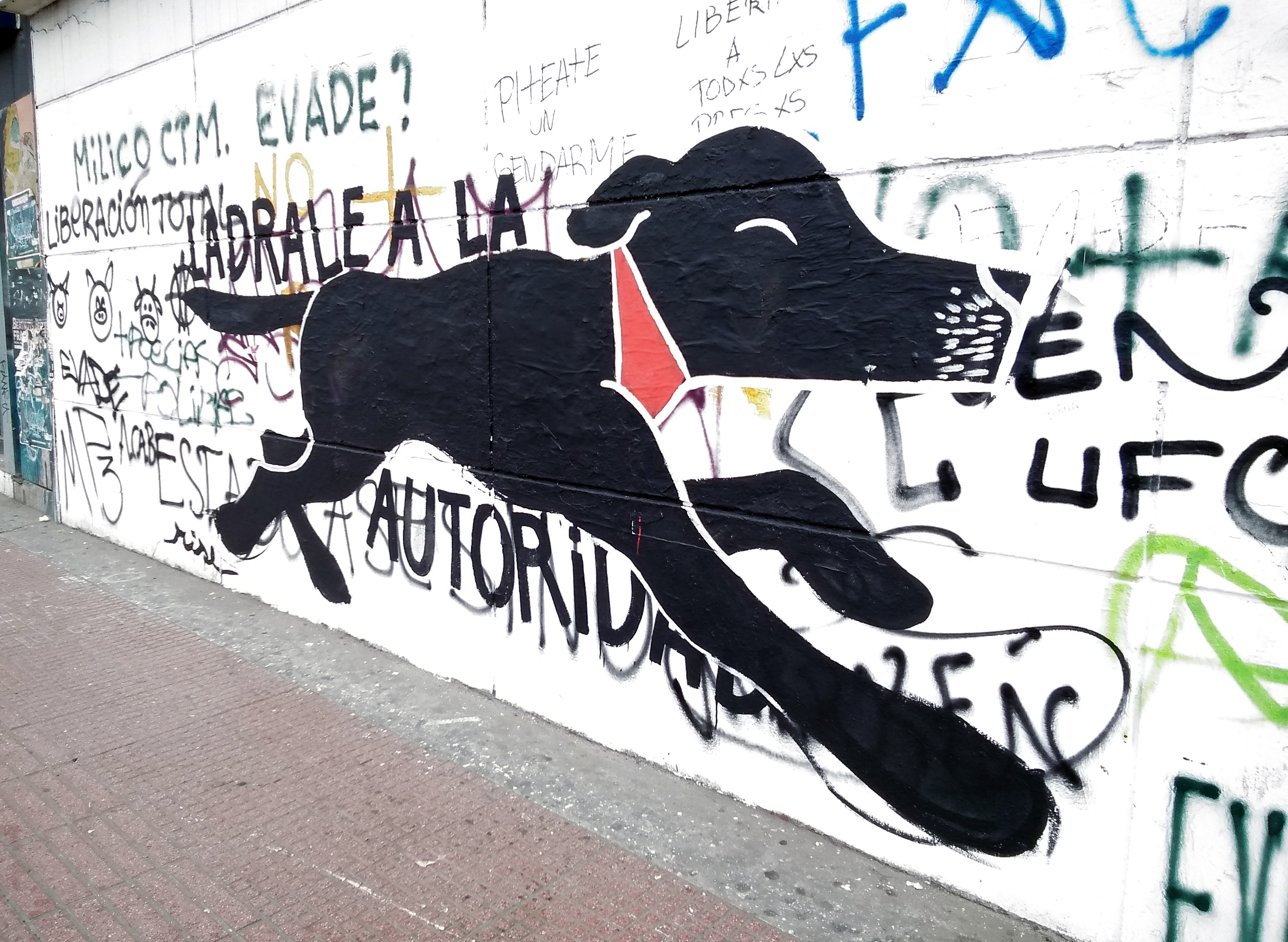 Representación del perro "Negro Matapacos" en un rayado mural en La Cisterna, Chile.